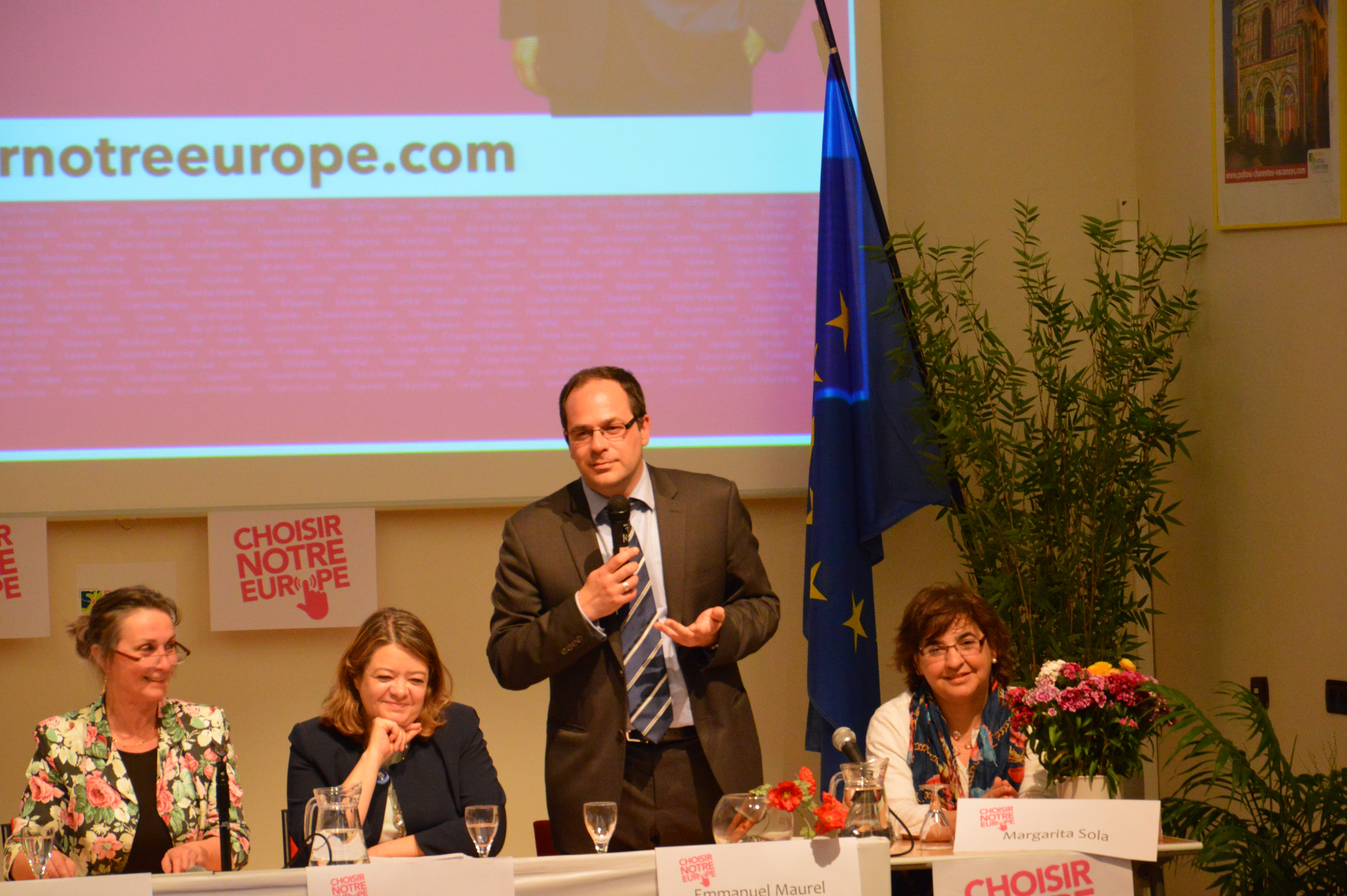 Photo des candidats PS du Grand-Ouest. Meeting des Ruralies (Deux-Sèvres), campagne des élections européennes 2014.